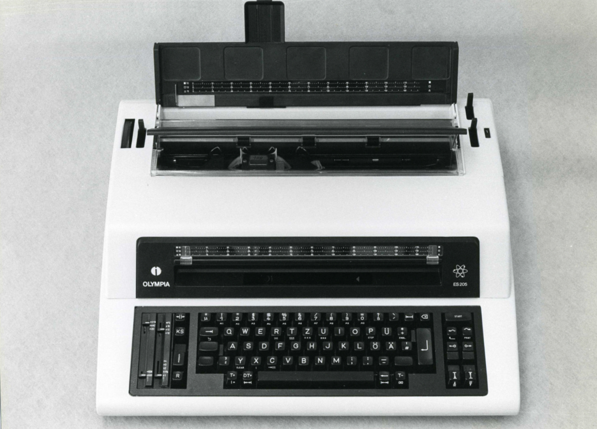 Eine der letzten von den Olympia-Werken entwickelte Schreibmaschine. Die Maschine wurde jedoch nicht mehr produziert.